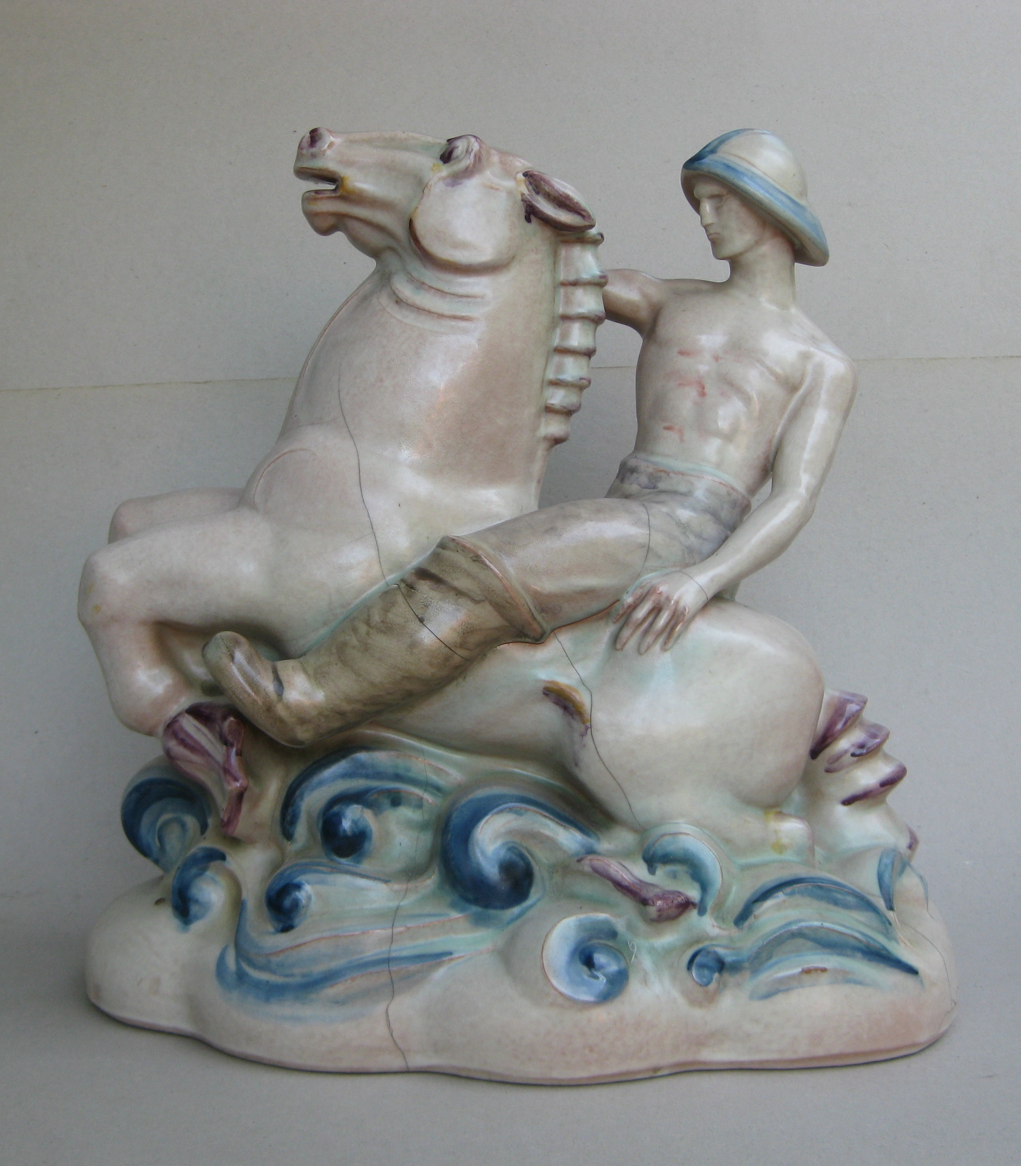 Kieler Kunst-Keramik AG, Meerreiter, 1924, Height 42 cm. Design: Augusta Kaiser, Norddeutsche Privatsammlung